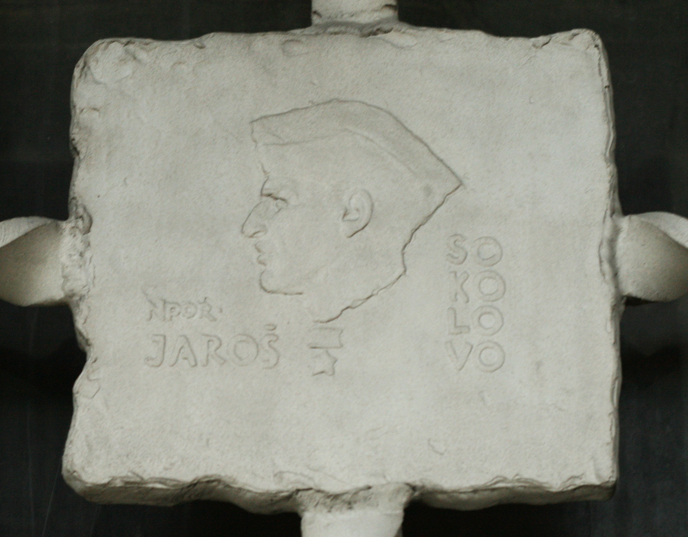 Own work, all rights released (Public domain)